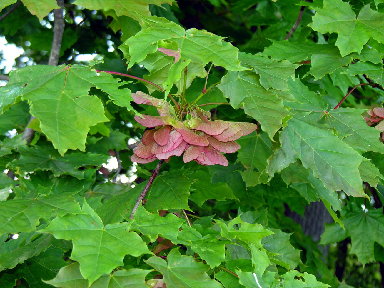 Paprastasis klevas (Acer platanoides) Šeima. Kleviniai (Aceraceae) Foto: Algirdas, 2006 m. birželio 2 d.